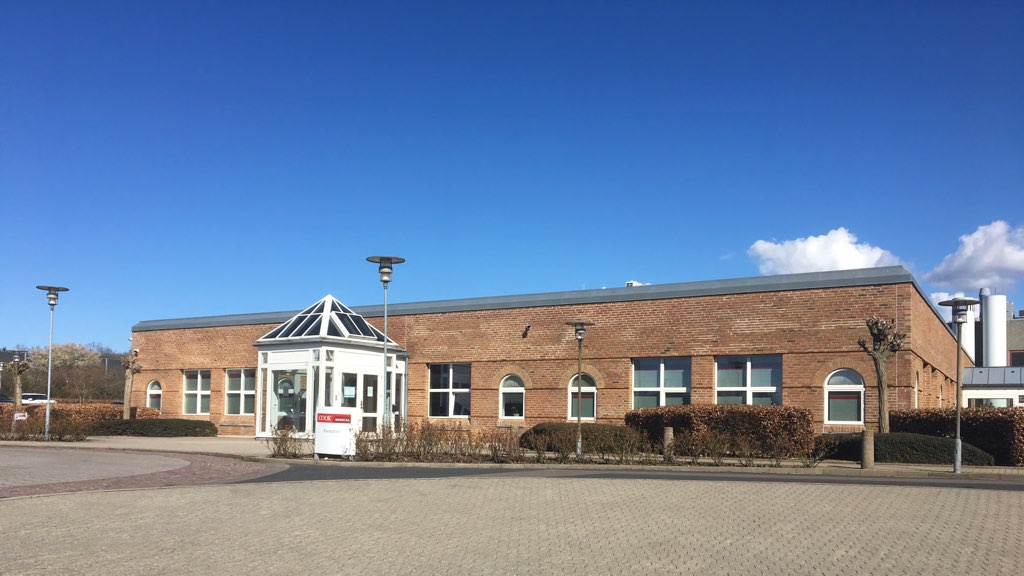 Cook Medical i Bjæverskov.